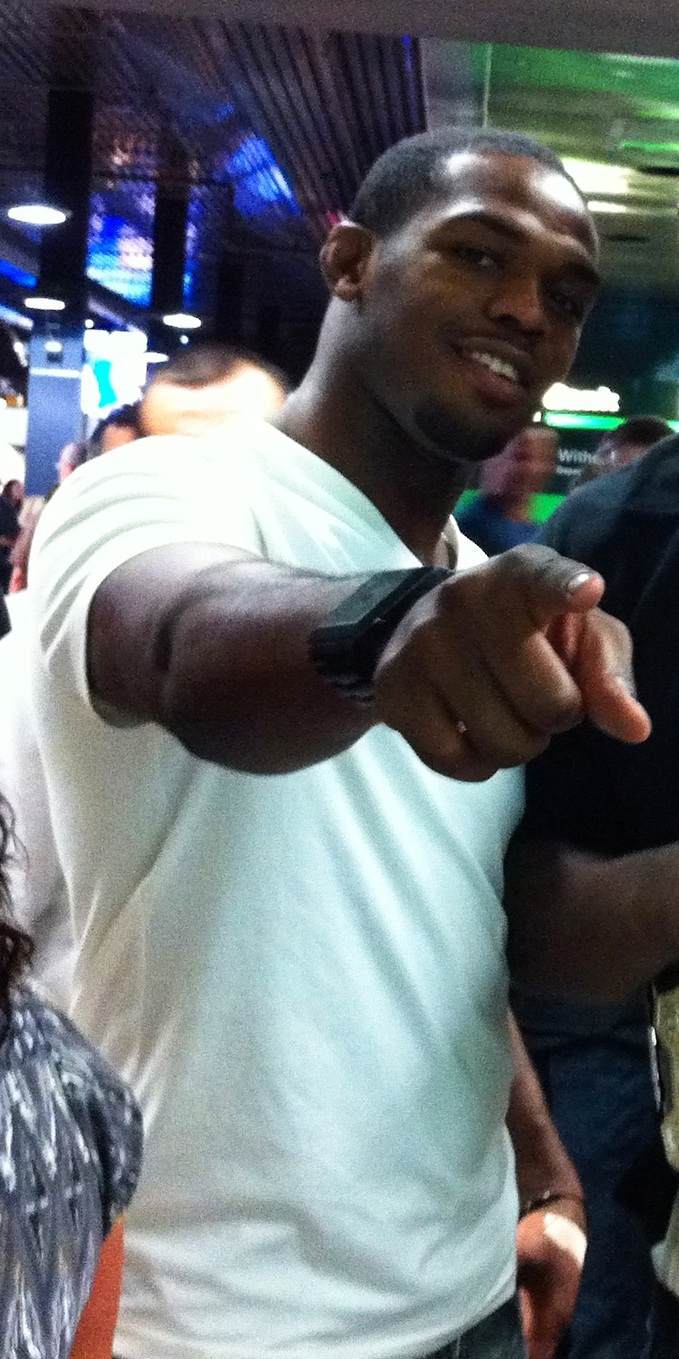 Le champion des poids lourds-légers de l'UFC Jon "Bones" Jones.